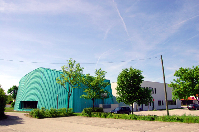 Planegg: Kulturzentrum "Kupferhaus", 11 km from M?en, Deutschland (Zone 32).